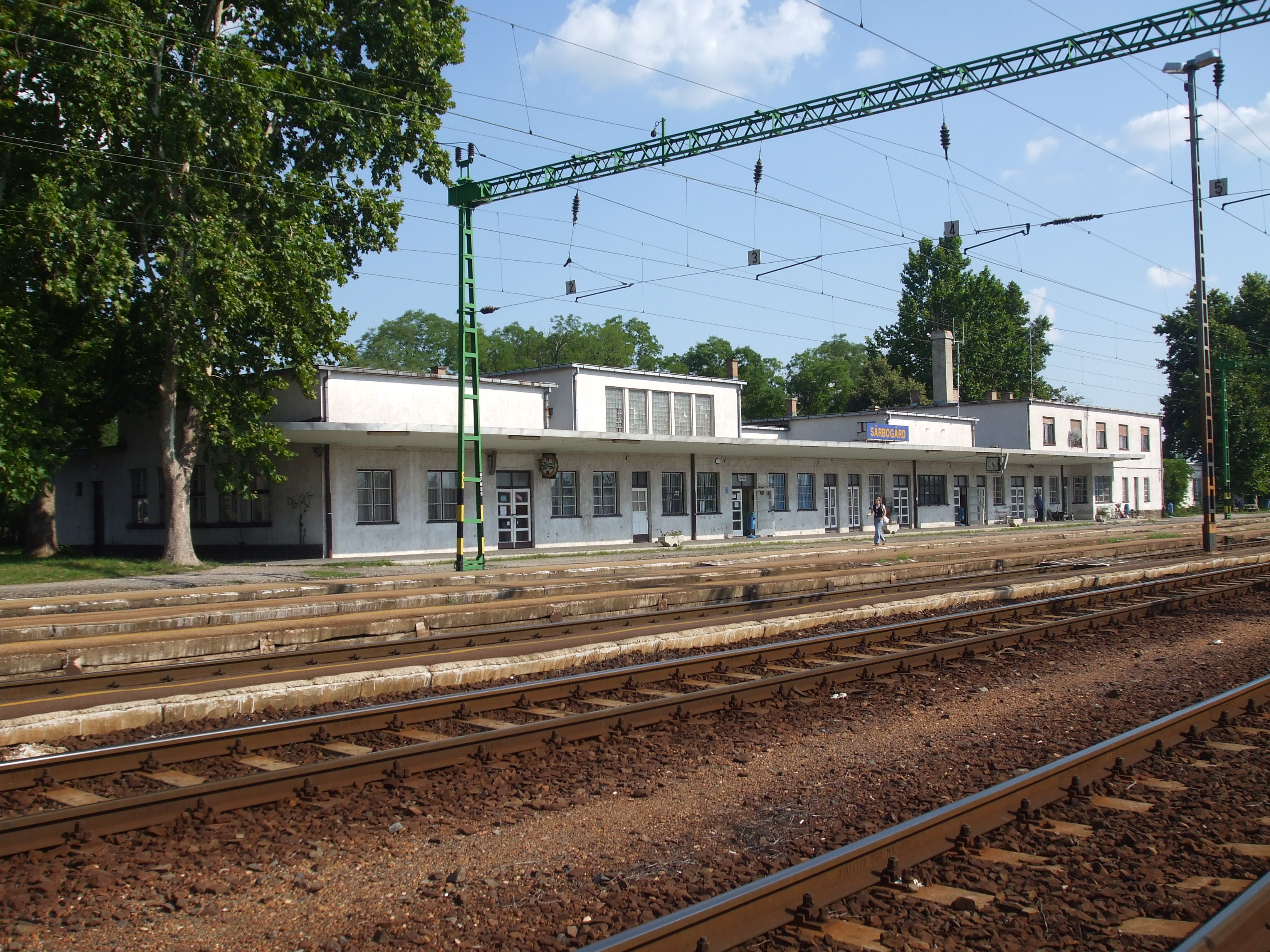 Sárbogárd vasútállomásának felvételi épülete.